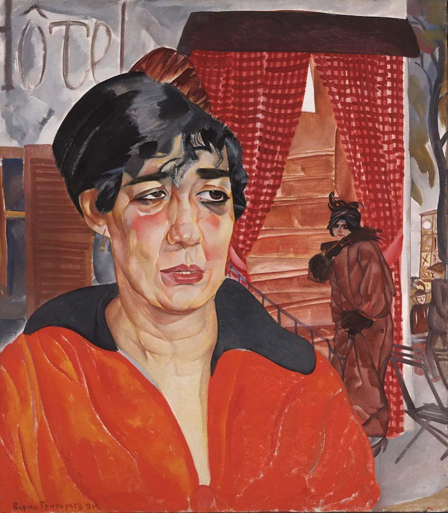 Б.Григорьев. Консъержка